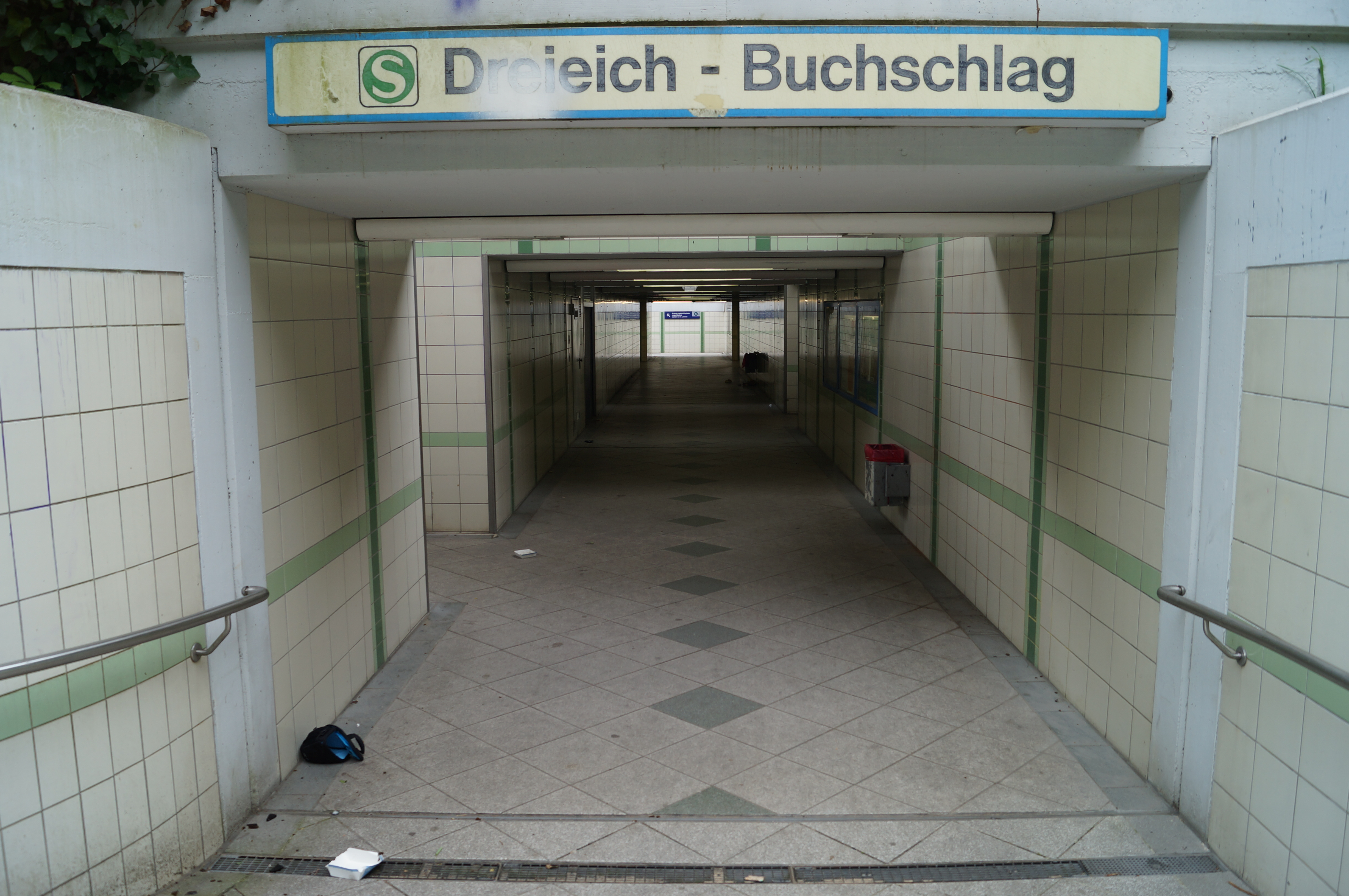 Haupteingang des Bahnhofs Dreieich-Buchschlag